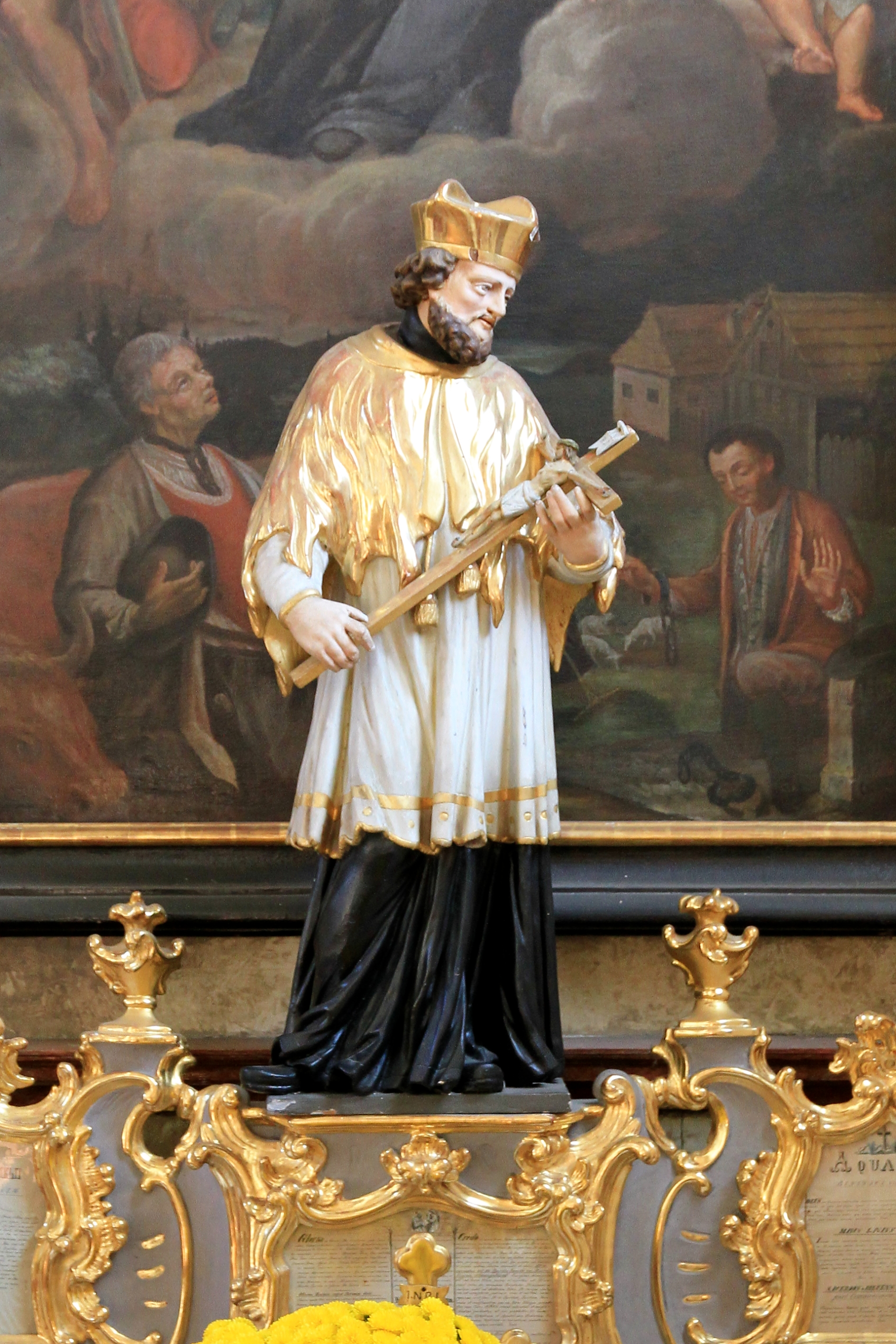 Nepomukstatue als zentrale Figur des rechten Seitenaltars der Pfarrkirche in der niederösterreichischen Marktgemeinde Gaming.